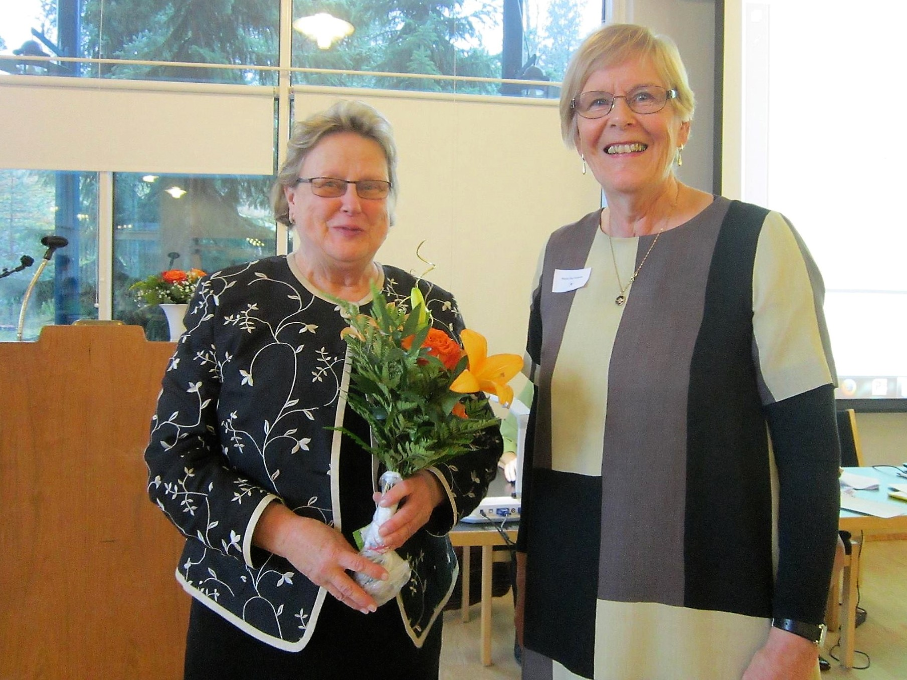 Helena Ranta ja Marja Liisa Toivanen 14.11.2015 Suomen Akateemisten Naisten Liiton vuosikokouksessa Työväen Akatemiassa Kauniaisissa.